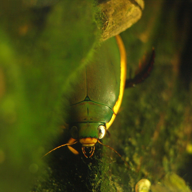 Cybister tripunctatus orientalis Gschwendtner, 1931